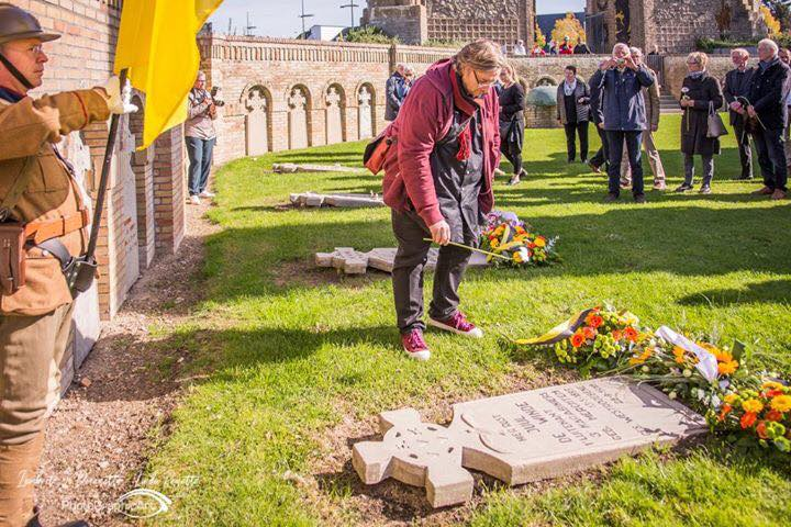 VOS aan de IJzer.